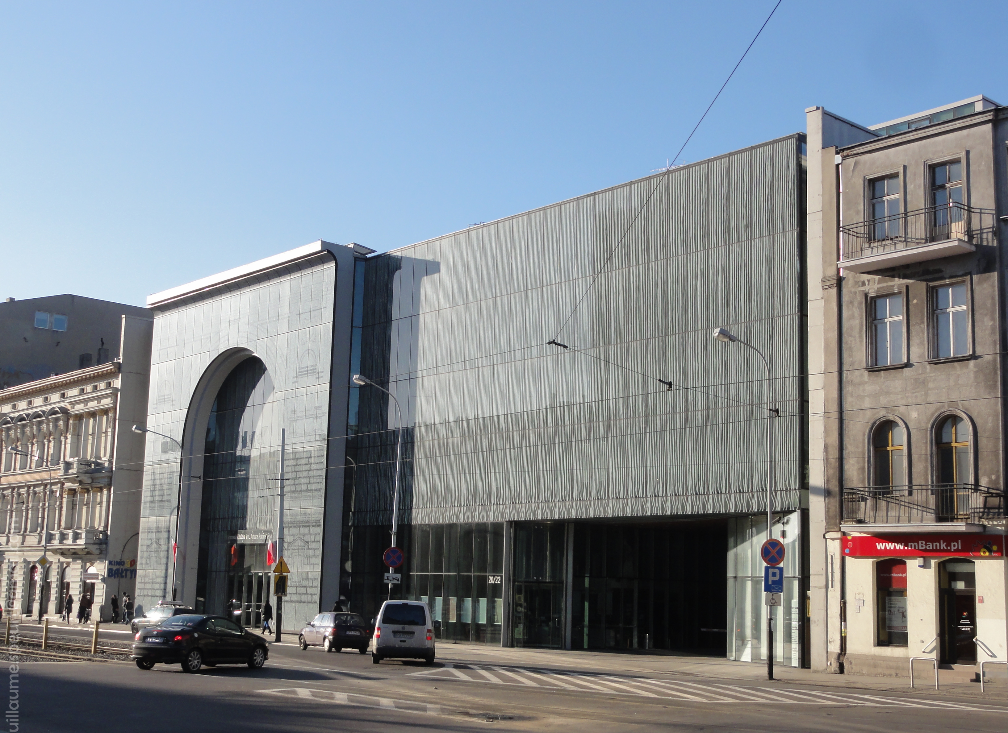 Filharmonia Łódzka (concert hall), Łódź, Poland